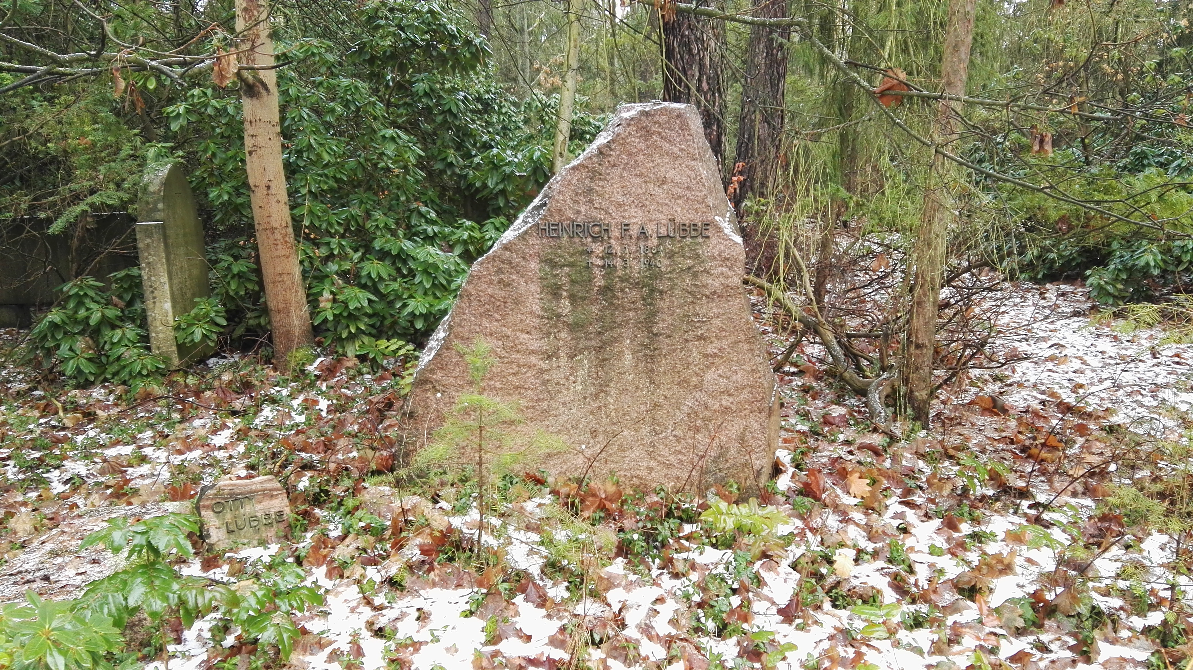 Grab von Heinrich Lübbe auf dem Südwestkirchhof Stahnsdorf